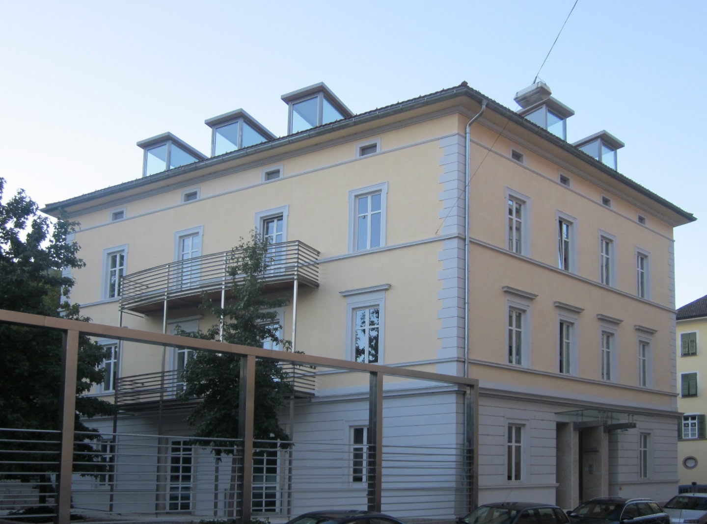 fondazione cassa di risparmio Bozano